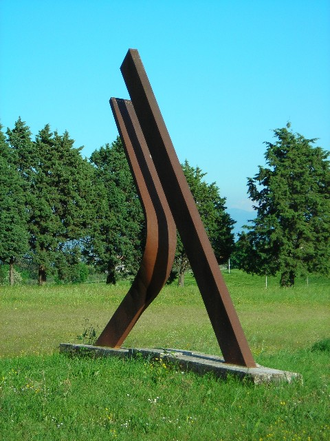 Thaun, sculpture of Agapito Miniucchi, Brufa, Torgiano, Perugia, Umbria, Italy